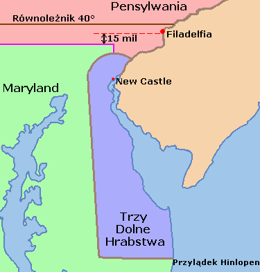 Dosłowne zapisy Traktatu z 1732 pomiędzy Calvertem a Pennami